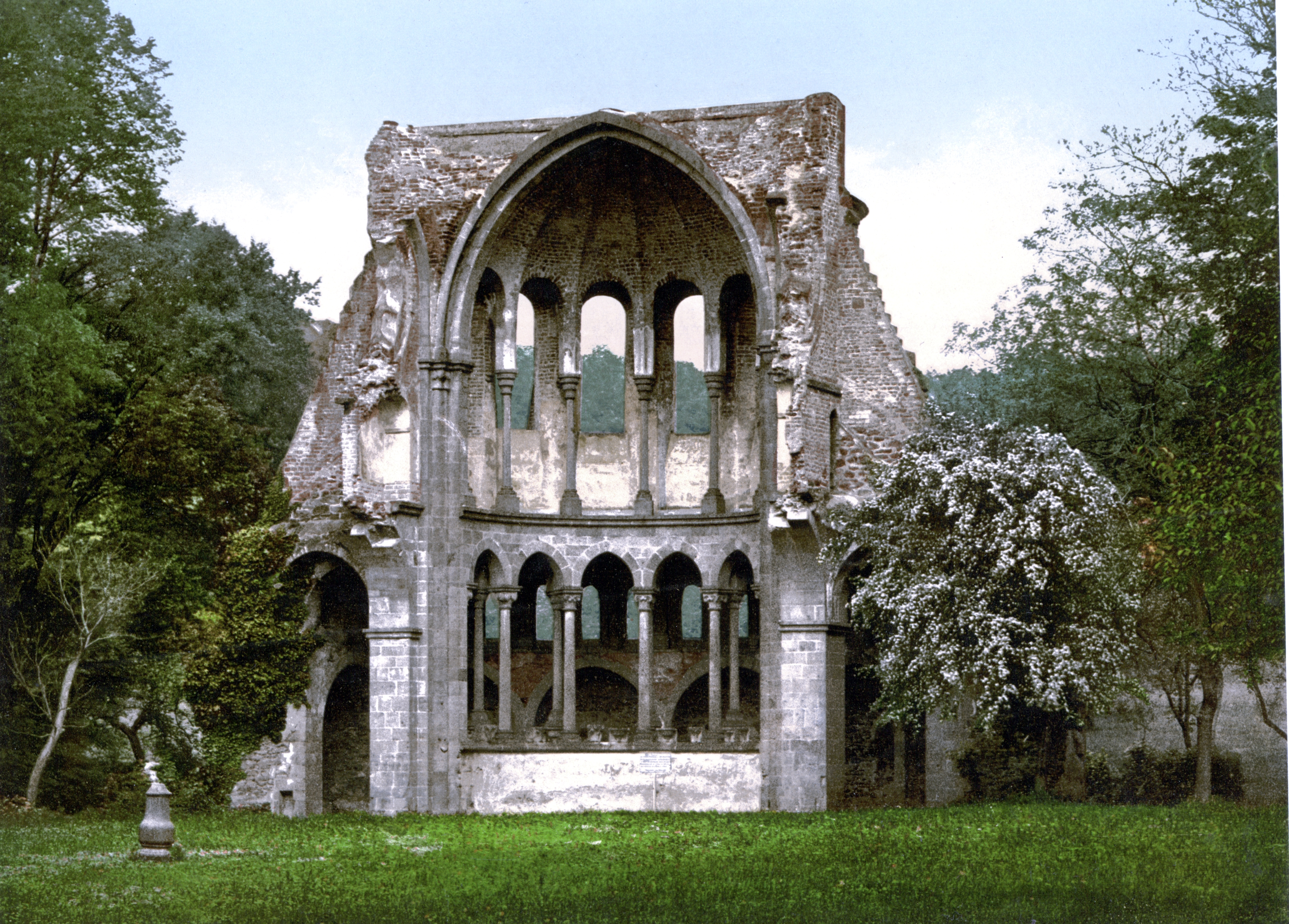 Chorruine der Abtei Heisterbach (Königswinter) um 1900